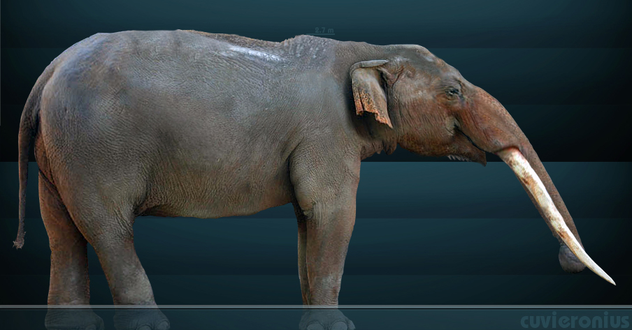 Ilustración 2D del Cuvieronius